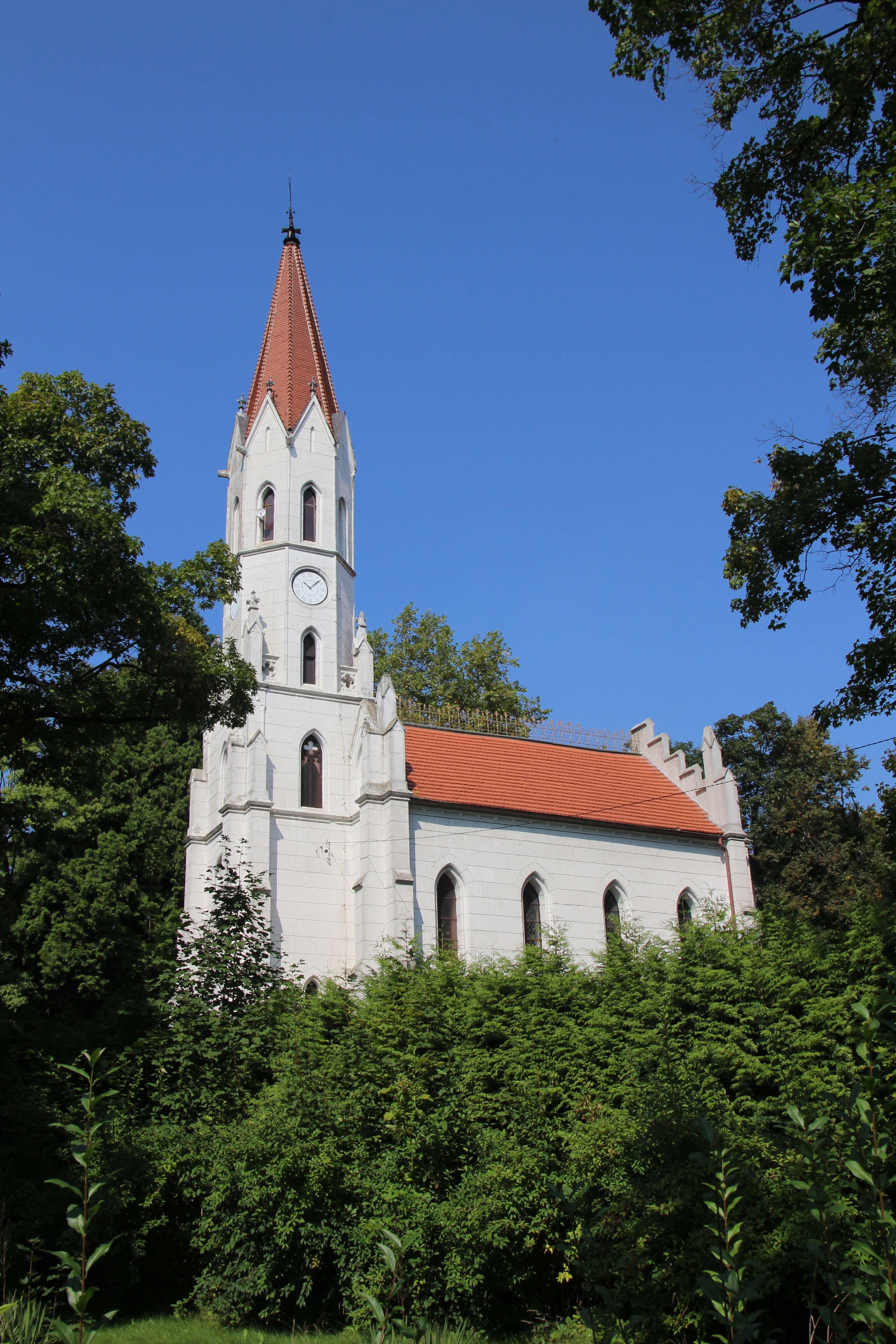 Biechów – pierwotnie kaplica pałacowa, obecnie rzymskokatolicki kościół filialny pw. MB Bolesnej, 1856-1865